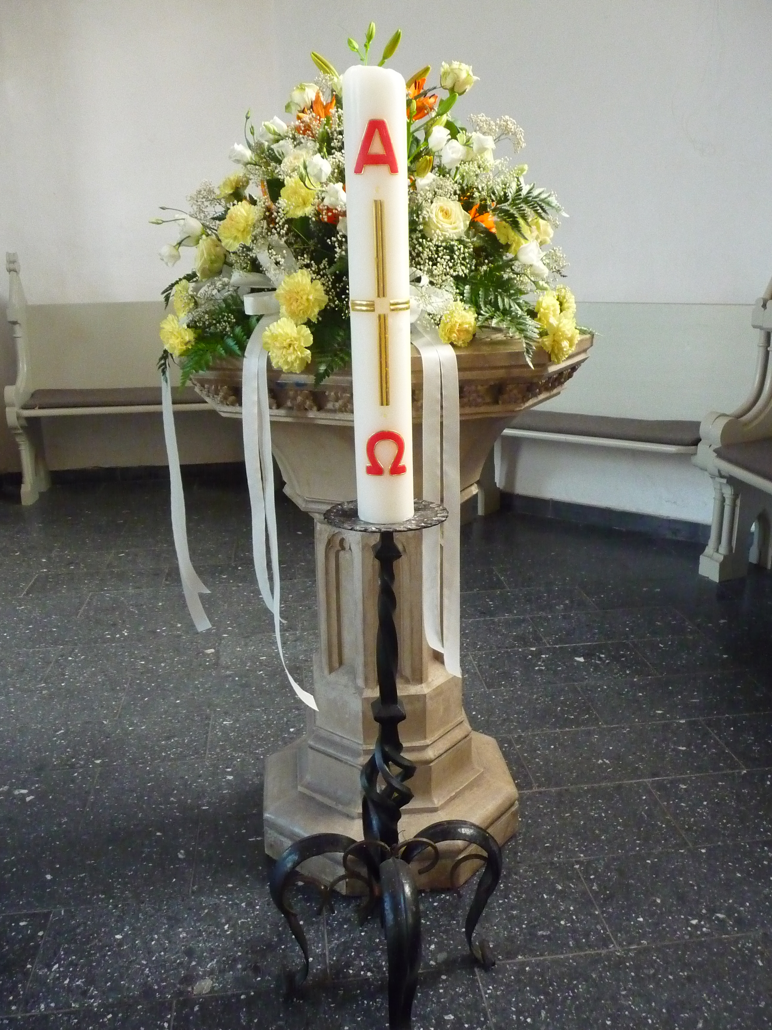 Osterkerze und Taufbecken in der evangelischen Inselkirche auf der ostfriesischen Nordseeinsel Juist (Niedersachsen, Deutschland)